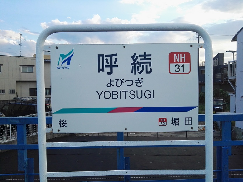 Yobitsugi station name board